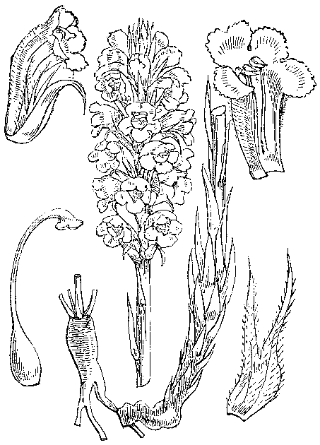 Slika 301. Deteljni poletni koren [sic!]. (Orobánche mínor.)